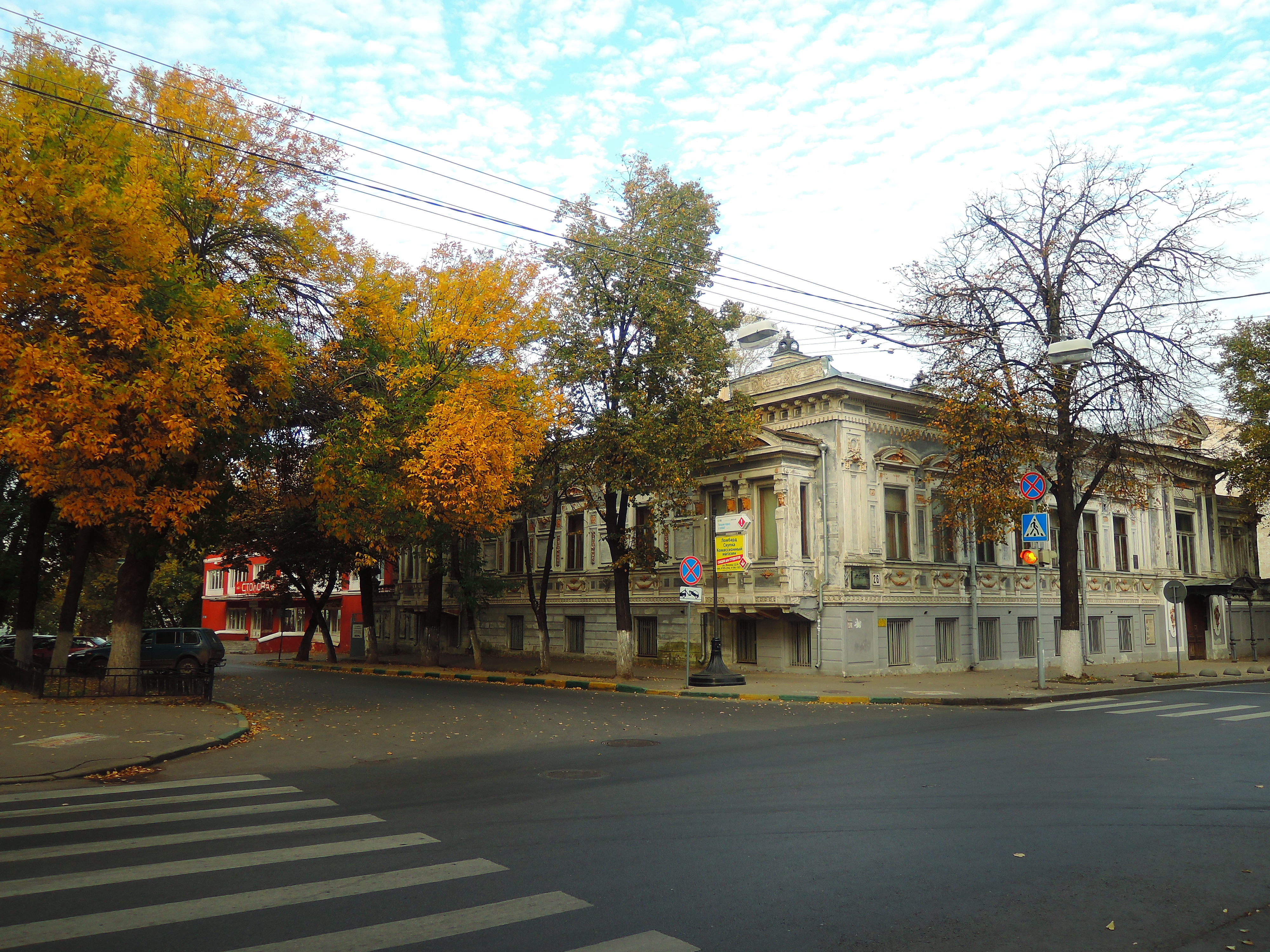 Особняк Бурмистровой с интерьером: улица Минина, 26, Нижний Новгород, Нижегородская область